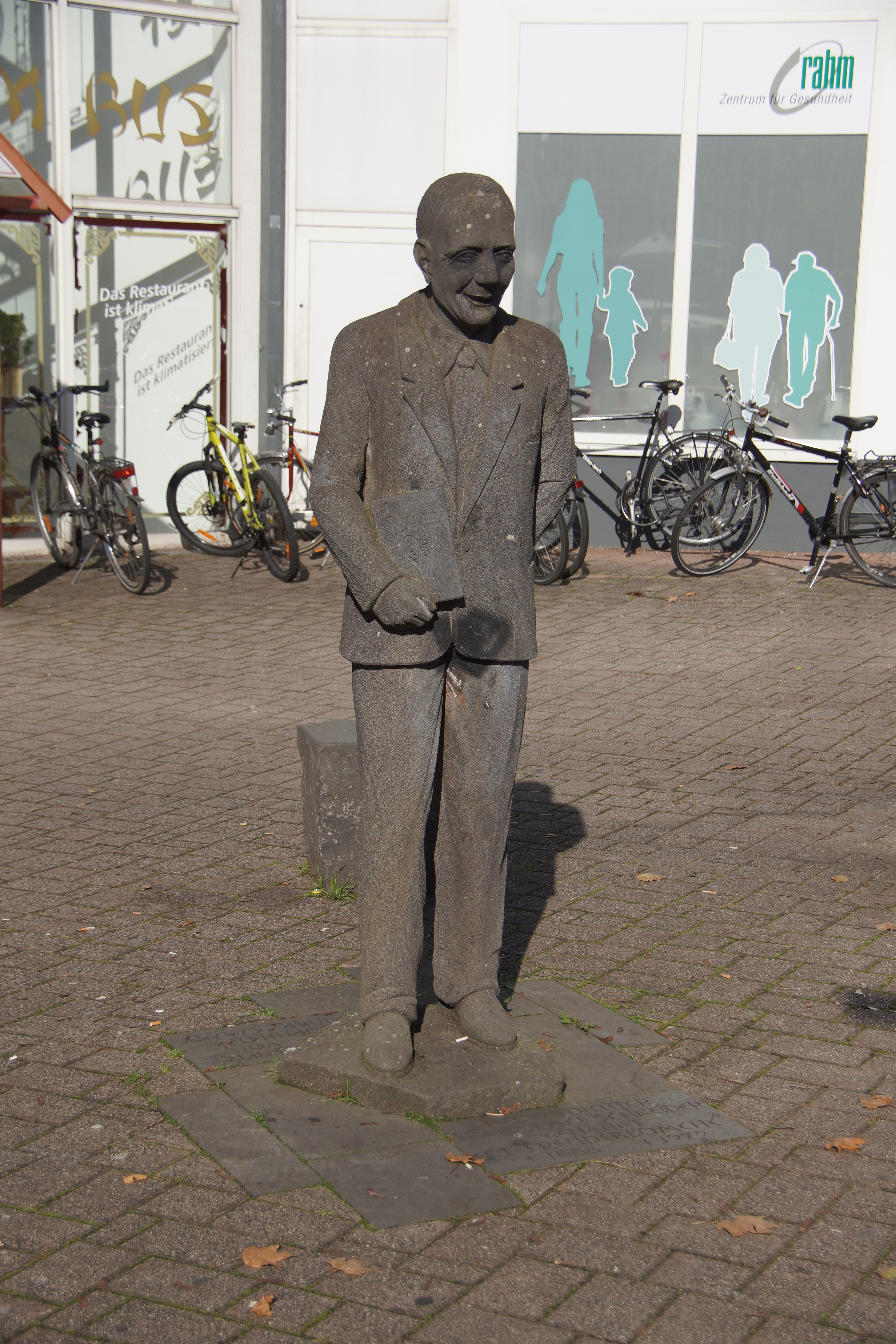 Heimatdichter Franzjosef Schneider (* 1888, † 1972); Skulptur in Bad Honnef, Ecke Bahnhofstraße/Steinstraße